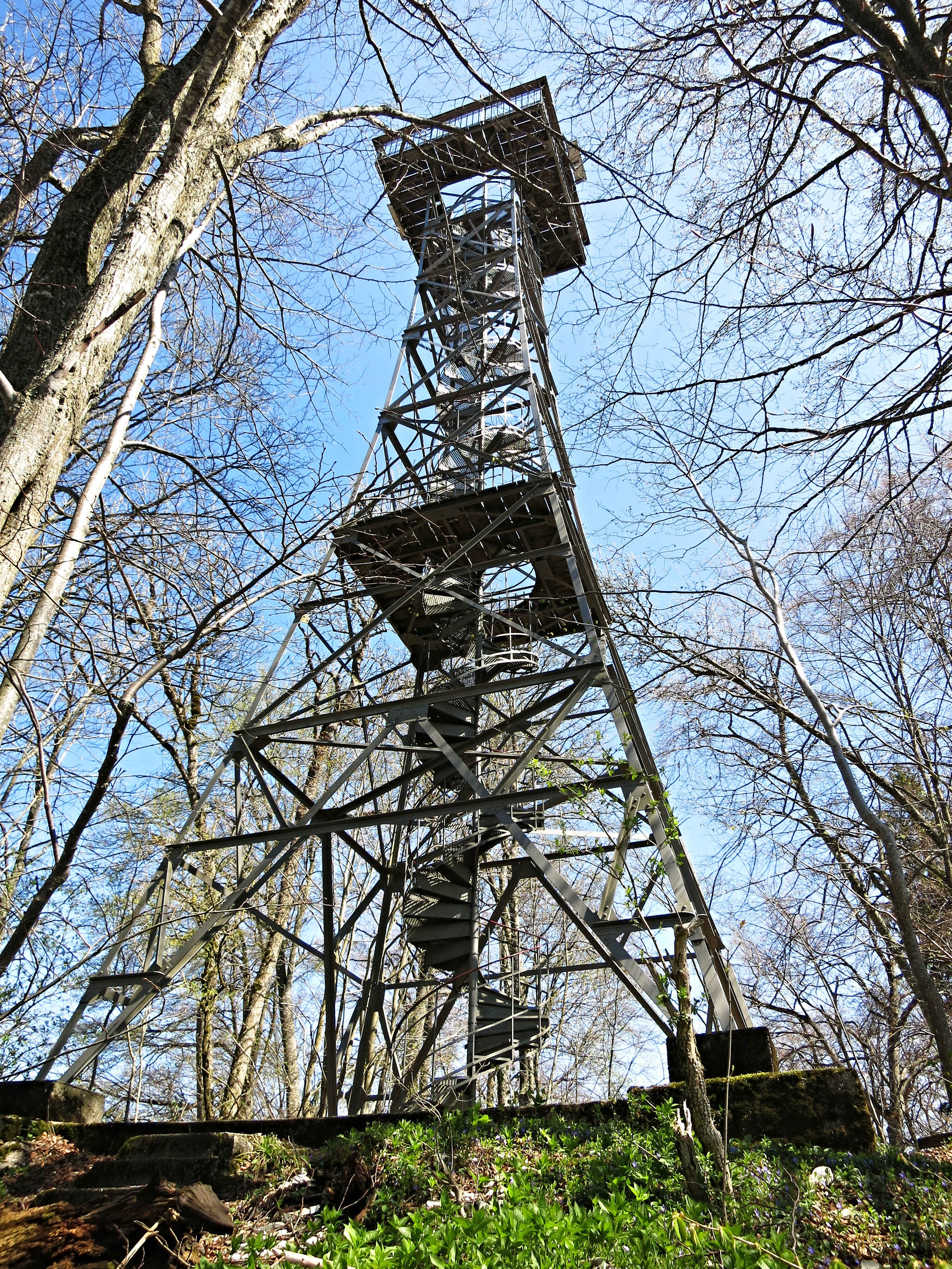 Schleitheimer Randenturm